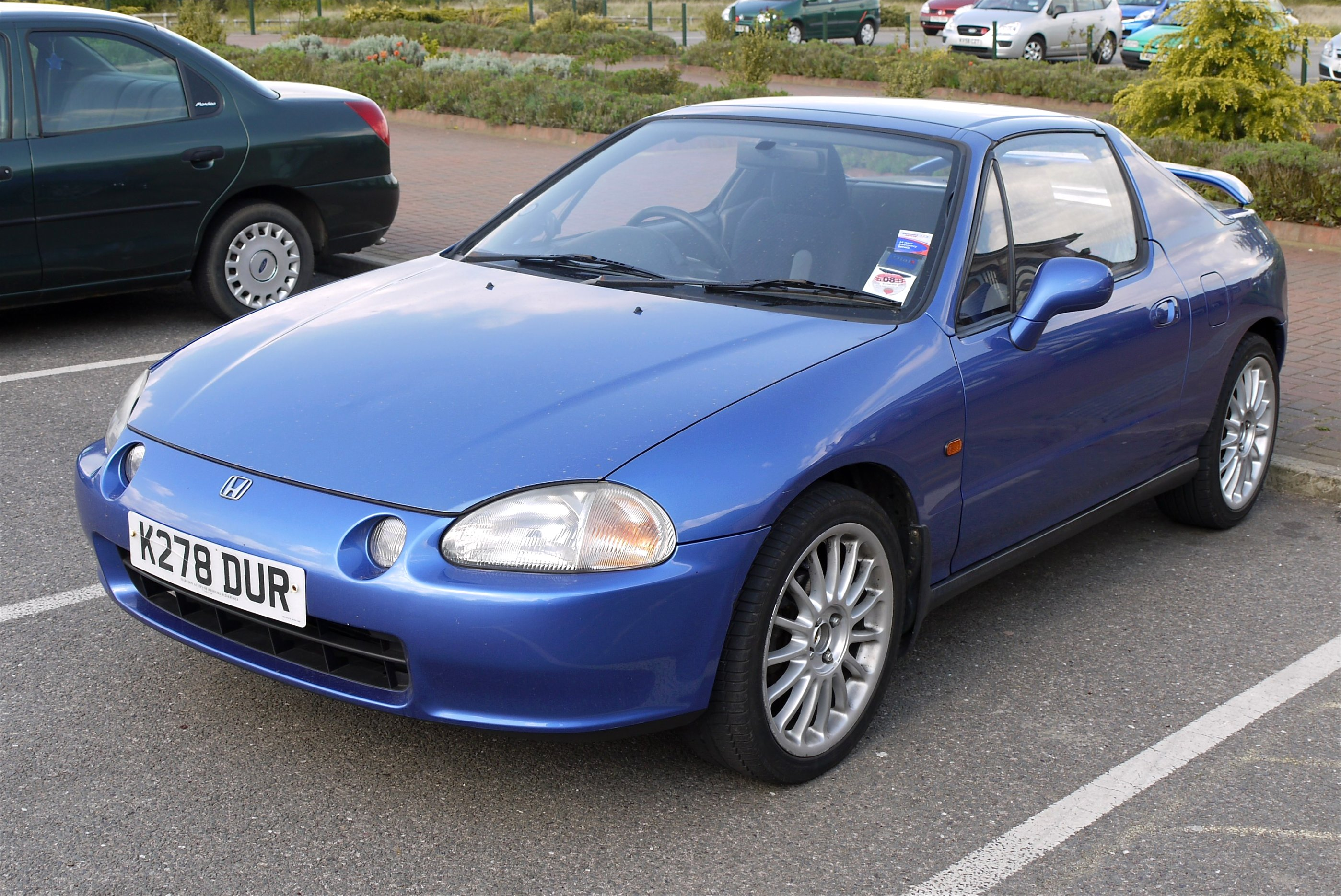 Panasonic G1 14-45 Lens